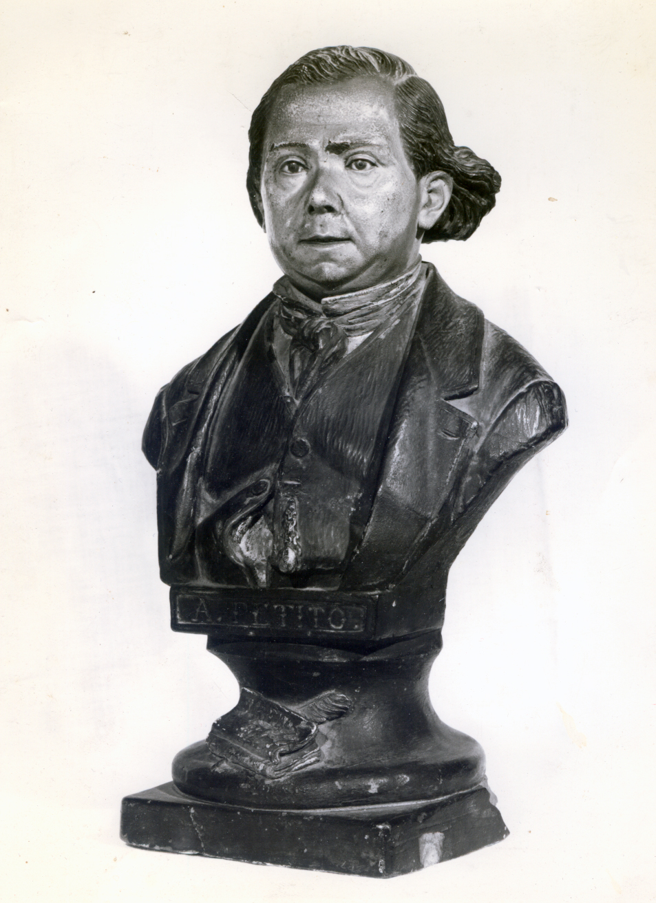 Busto ottocentesco di Petito di mia proprietà